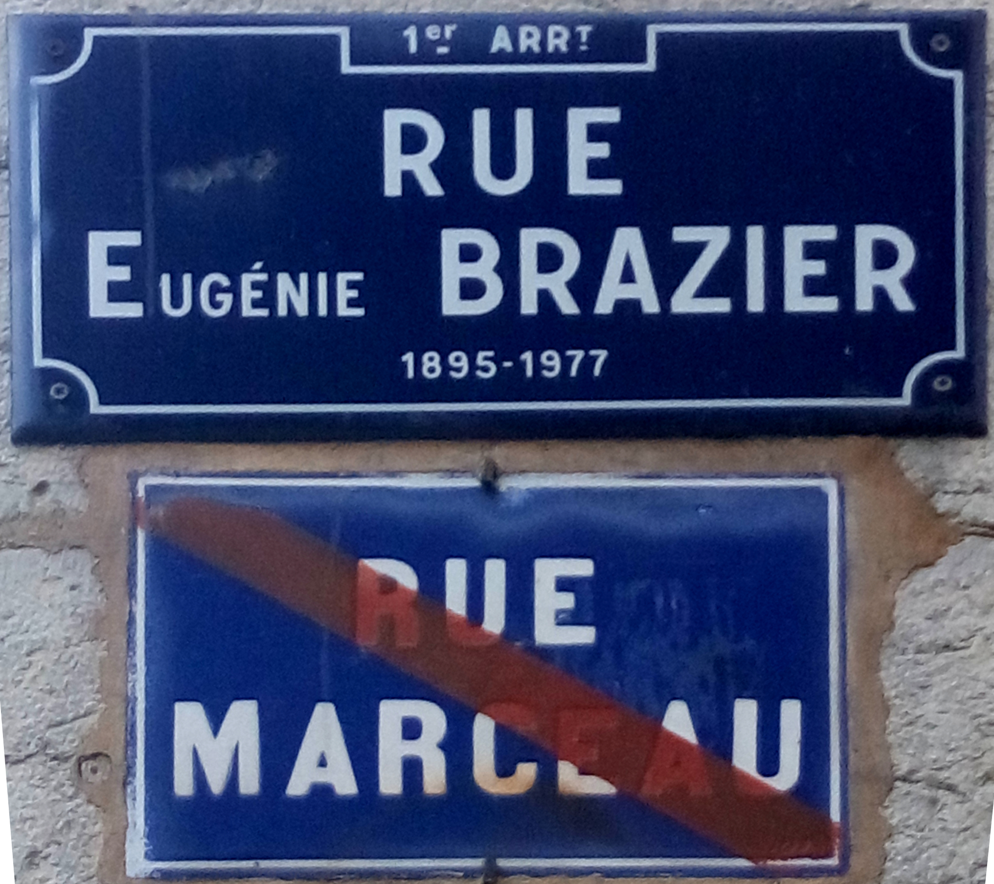 Plaque de la rue Eugénie Brazier, accompagnée de l'ancienne plaque de la rue Marceau, dans le 1er arrondissement de Lyon.